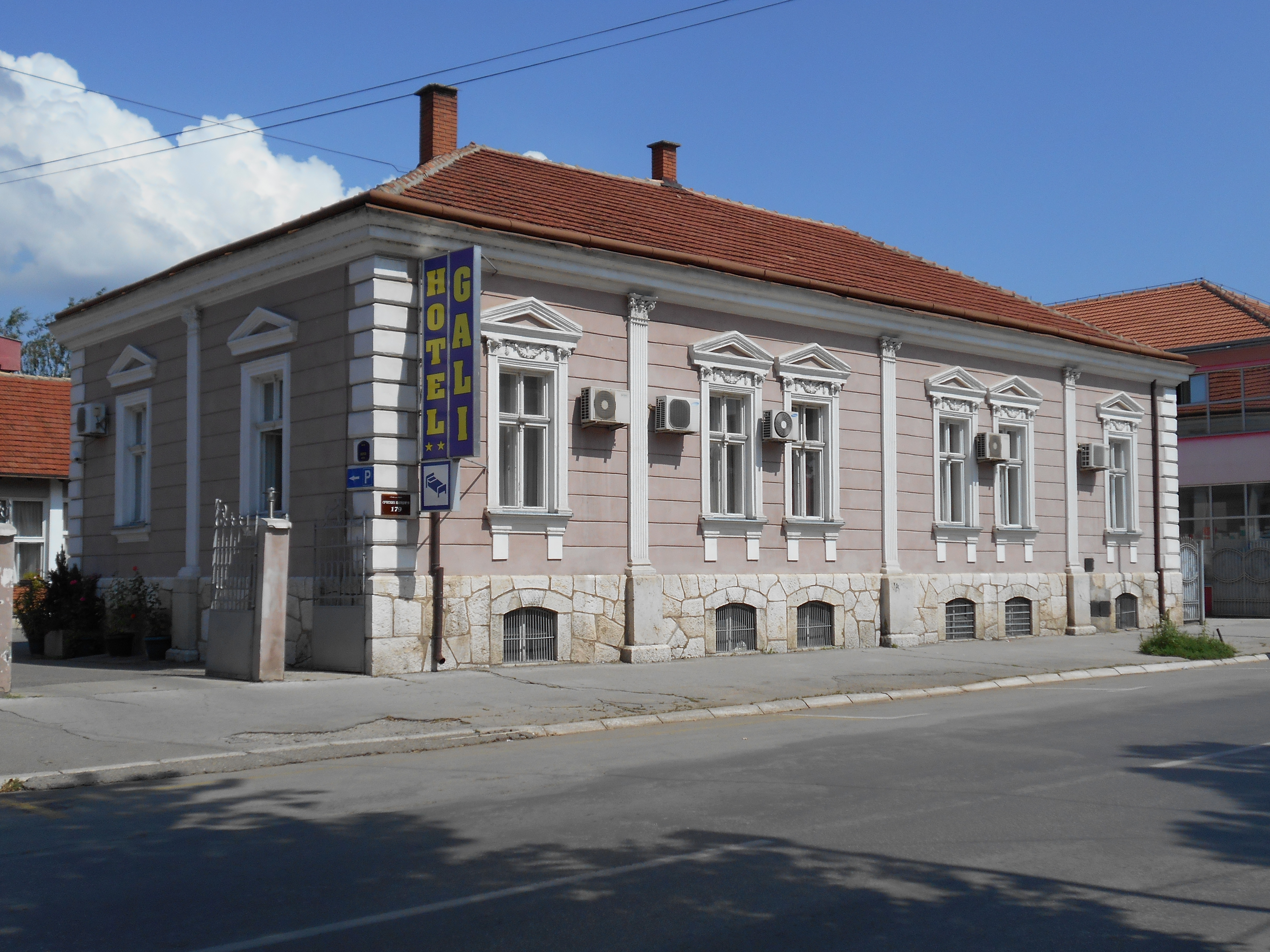 Зграда окружног начелства у Пироту